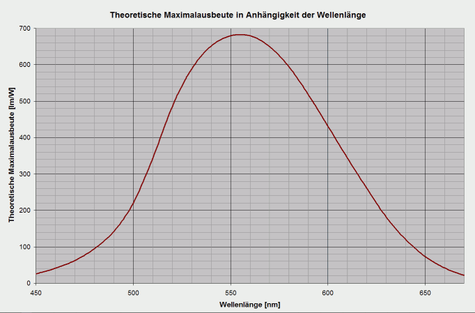 Maximallichtausbeute bei 100% Wirkungsgrad in Lumen/Watt